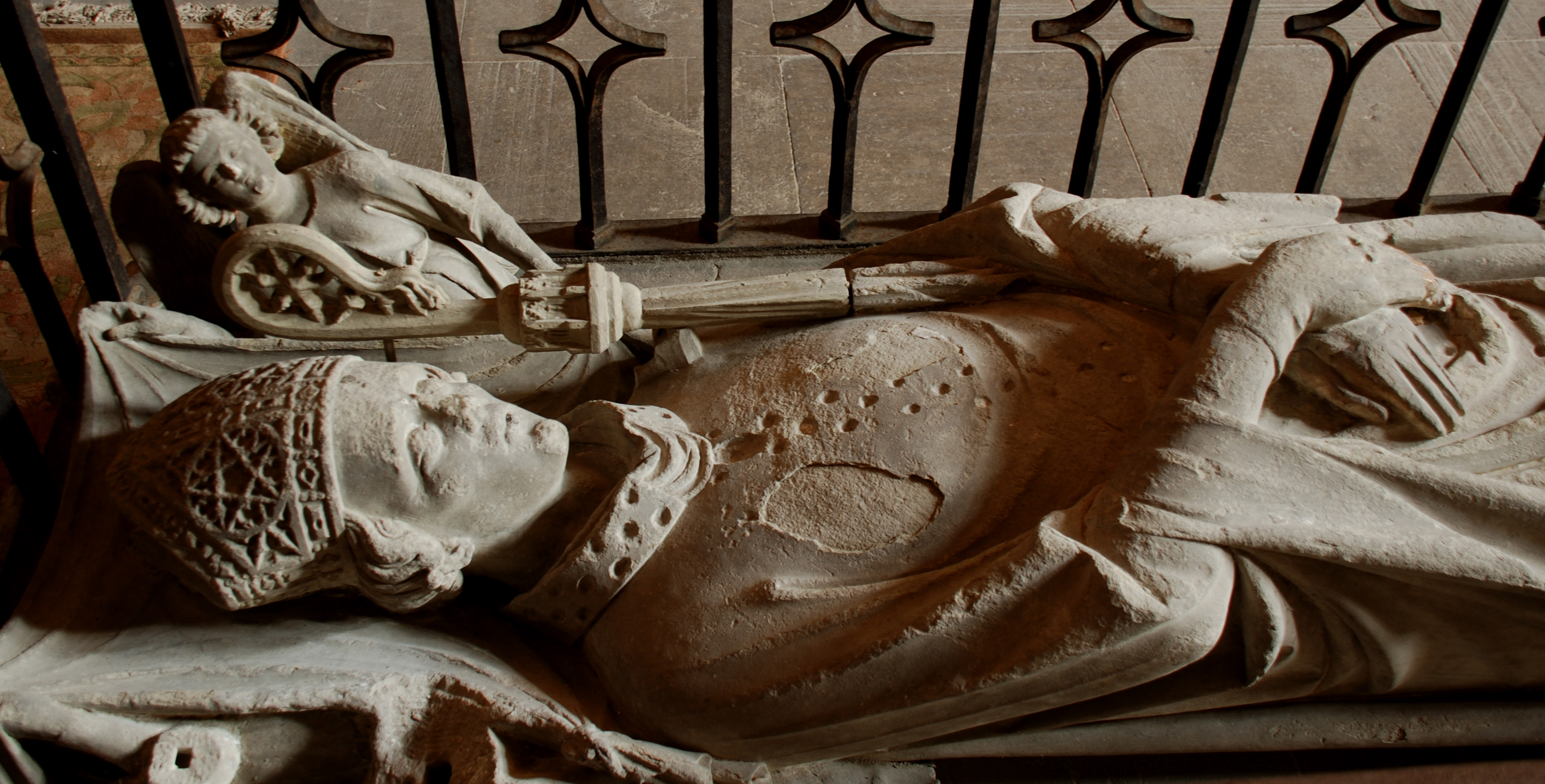 sepulcro barbazana